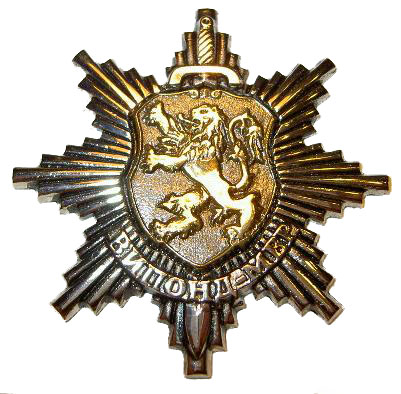 Награден знак за завършилите редовен 5 годишен кирс в ВИПОНД-МВР (1991-2002)